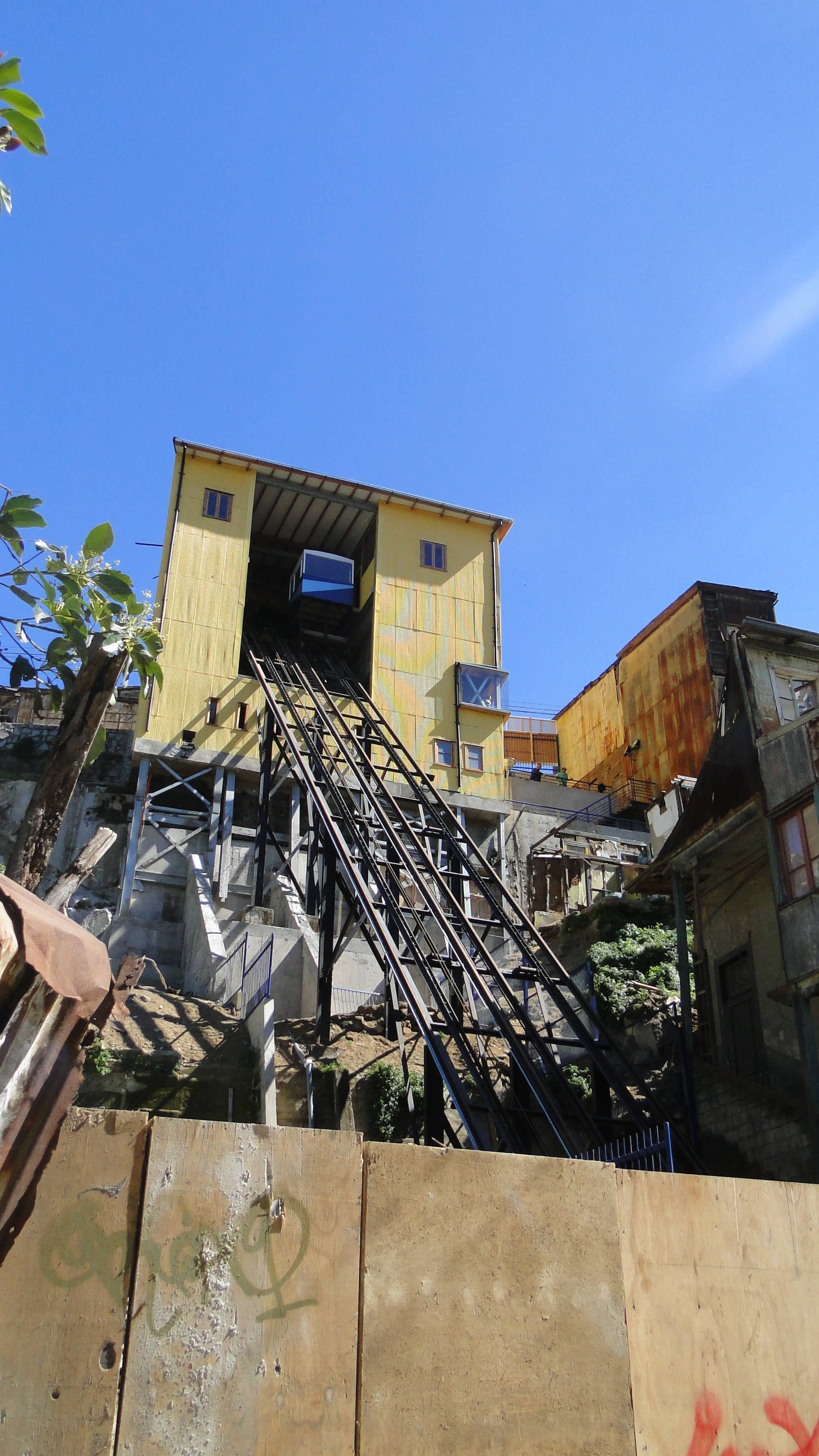 Ascensor San Agustín-Vista desde Calle Tomás Ramos 02 This is a photo of a national monument in Chile: 769